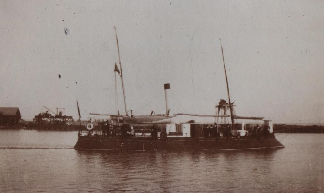 Canoniera românească "Fulgerul", construită în 1873 / Romanian cannon boat "Fulgerul", built in 1873.